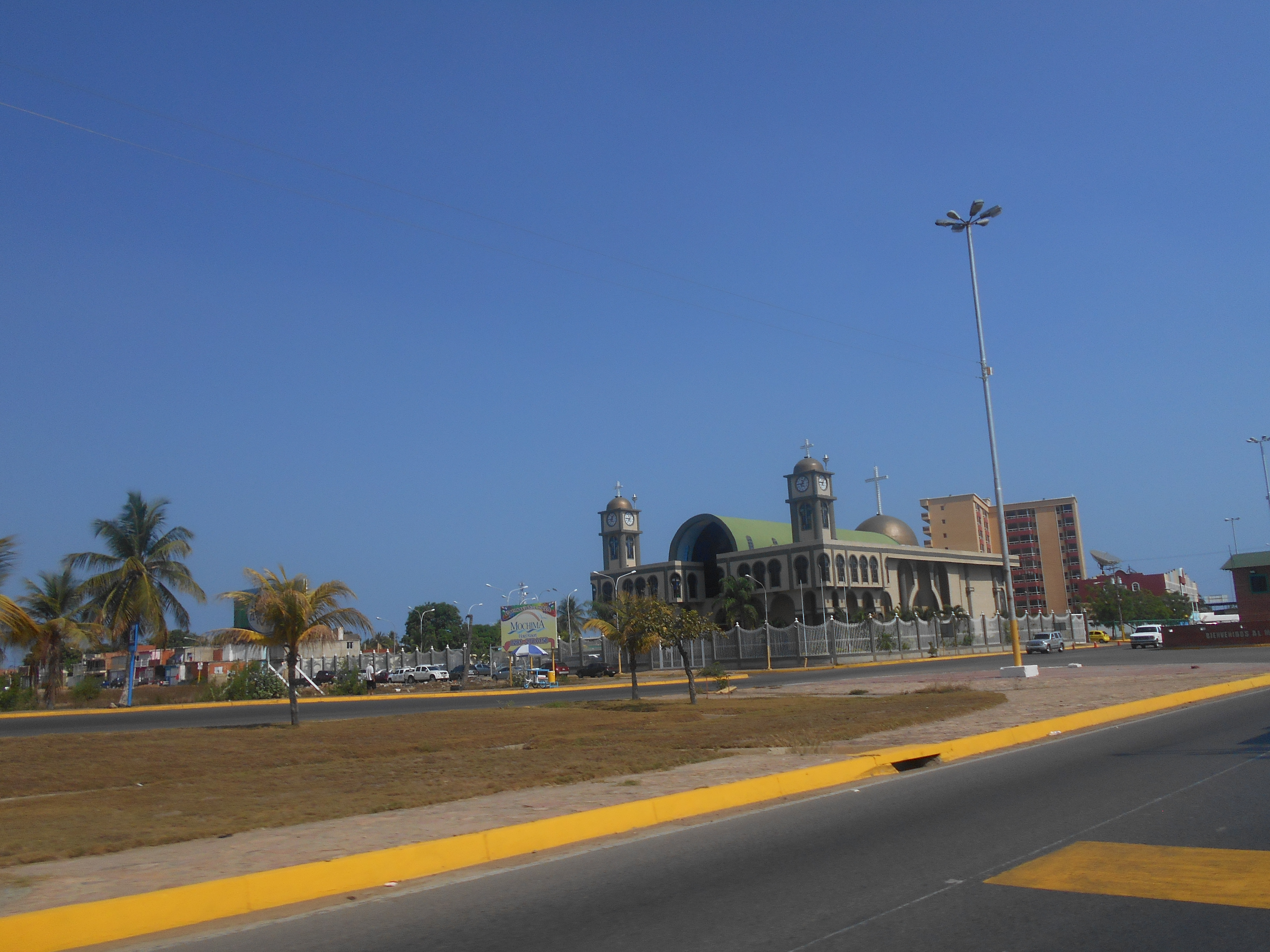 Hermosa avenida de puerto la cruz.